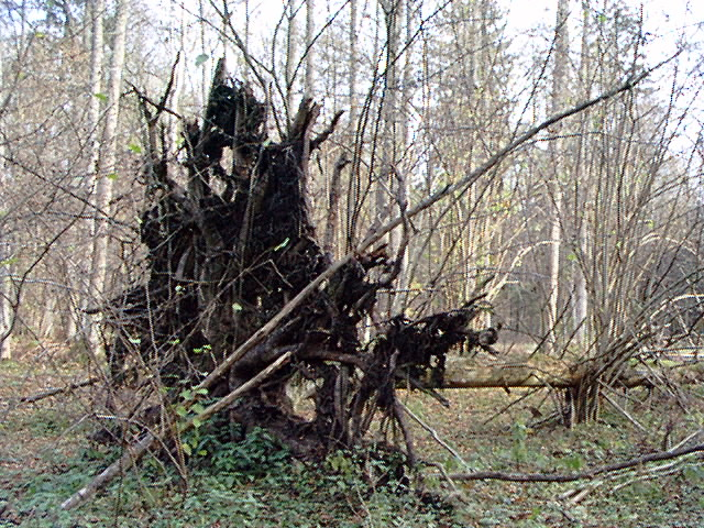 Rezerwat Szczekotowo, wywrócony świerk, po prawej stronie Łutowni. Fotografia wykonana w październiku 2000.